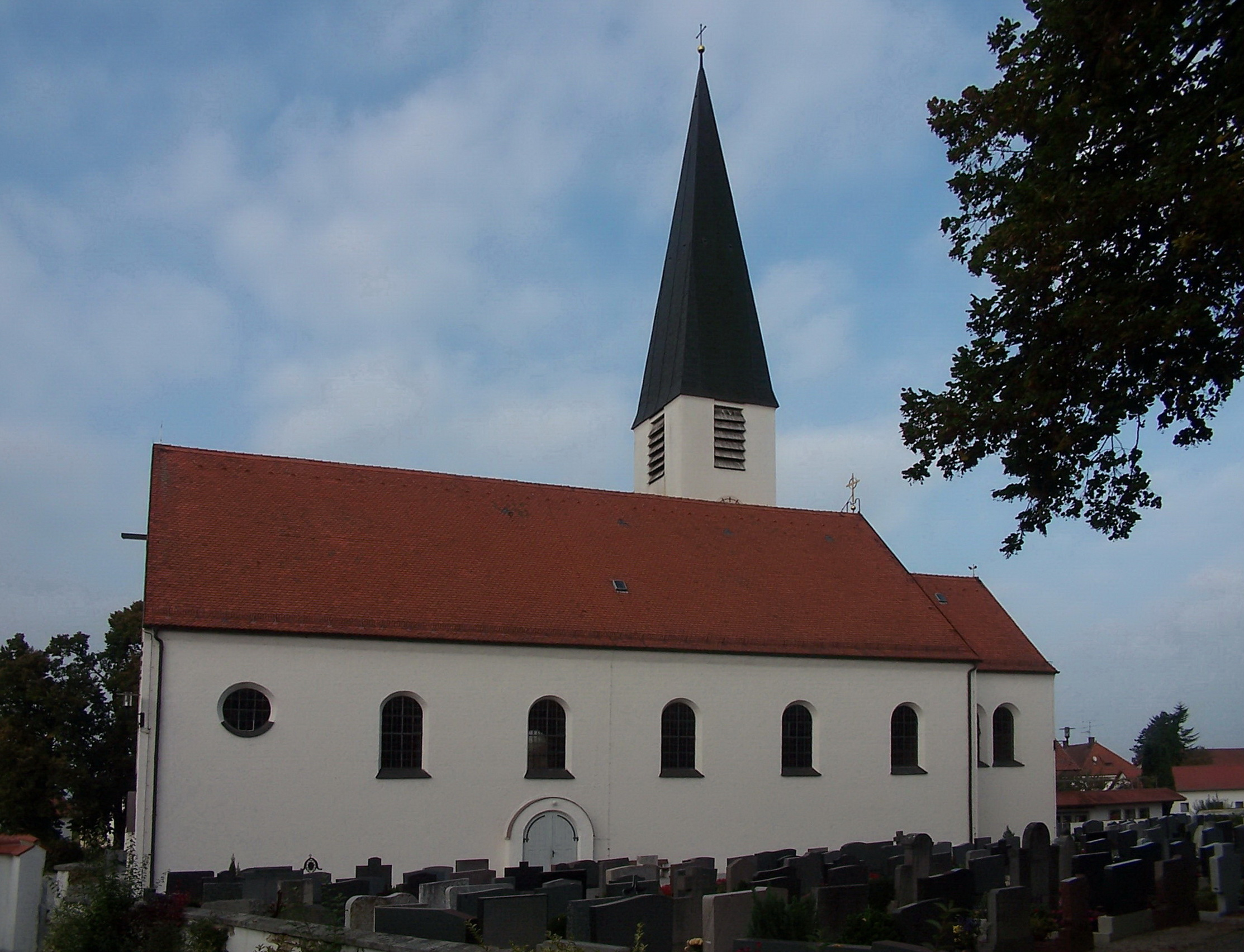 Mamming. Katholische Pfarrkirche St. Margareta von 1947/49.